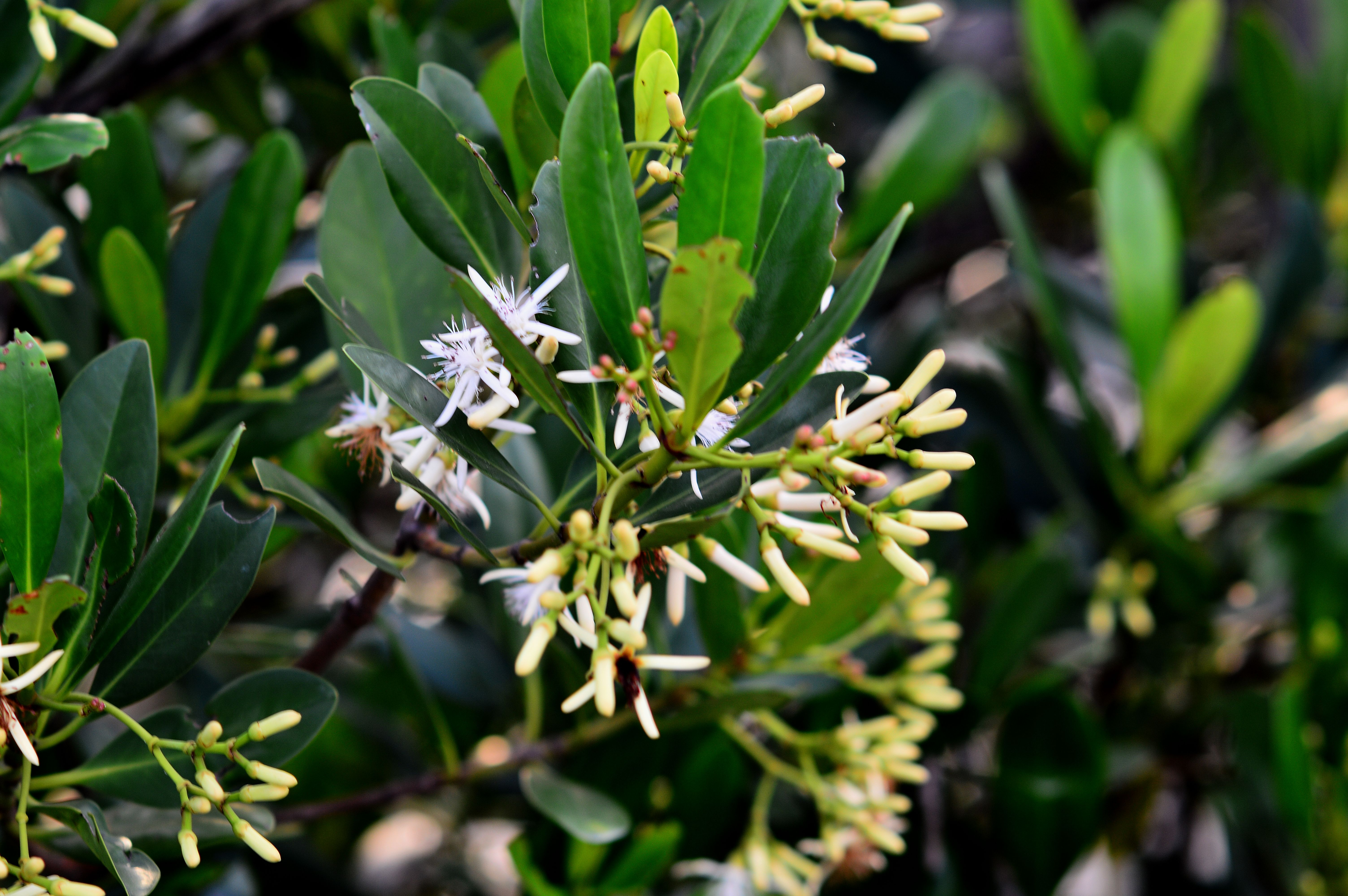 紅樹林開花